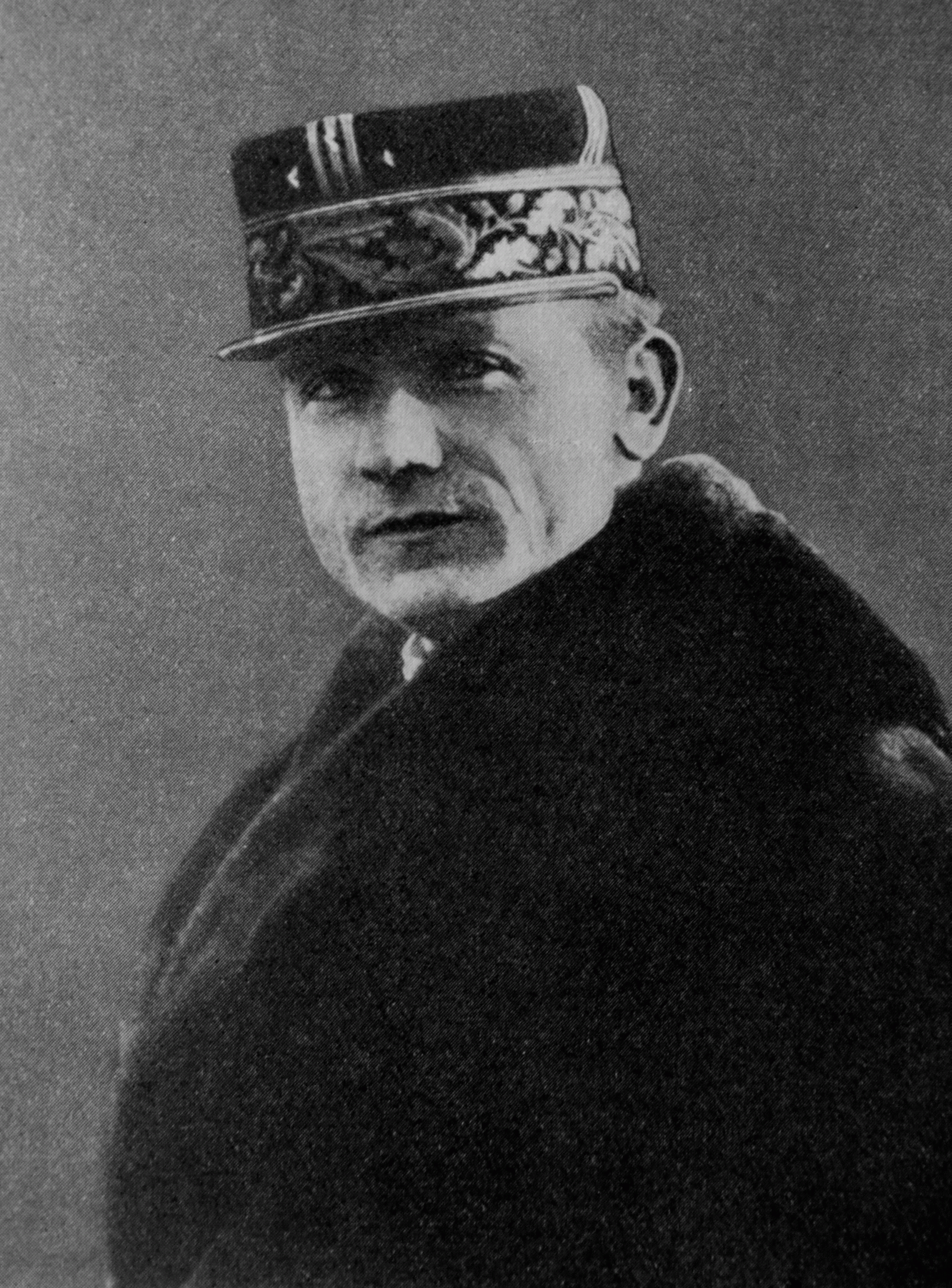 Milan Rastislav Štefánik (* 21. července 1880 Košariská – 4. května 1919 Ivanka pri Dunaji) byl slovenský politik, generál francouzské armády a také astronom. V letech 1914 – 1918 organizoval československé legie v Srbsku, Rumunsku, Rusku, Itálii. Byl členem Národní rady v Paříži a v letech 1918 - 1919 československým ministrem vojenství. Na fotografii v hodnosti generála kdesi v Rusku. Foto před rokem 1920.